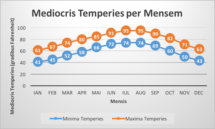 Mediocris temperies per mensem